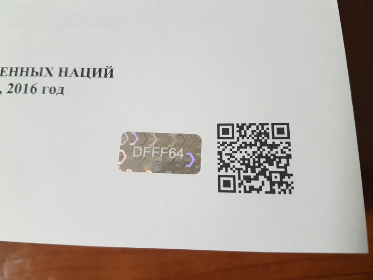 Вид голограммы в первом томе официального печатного издания ДОПОГ 2017 года